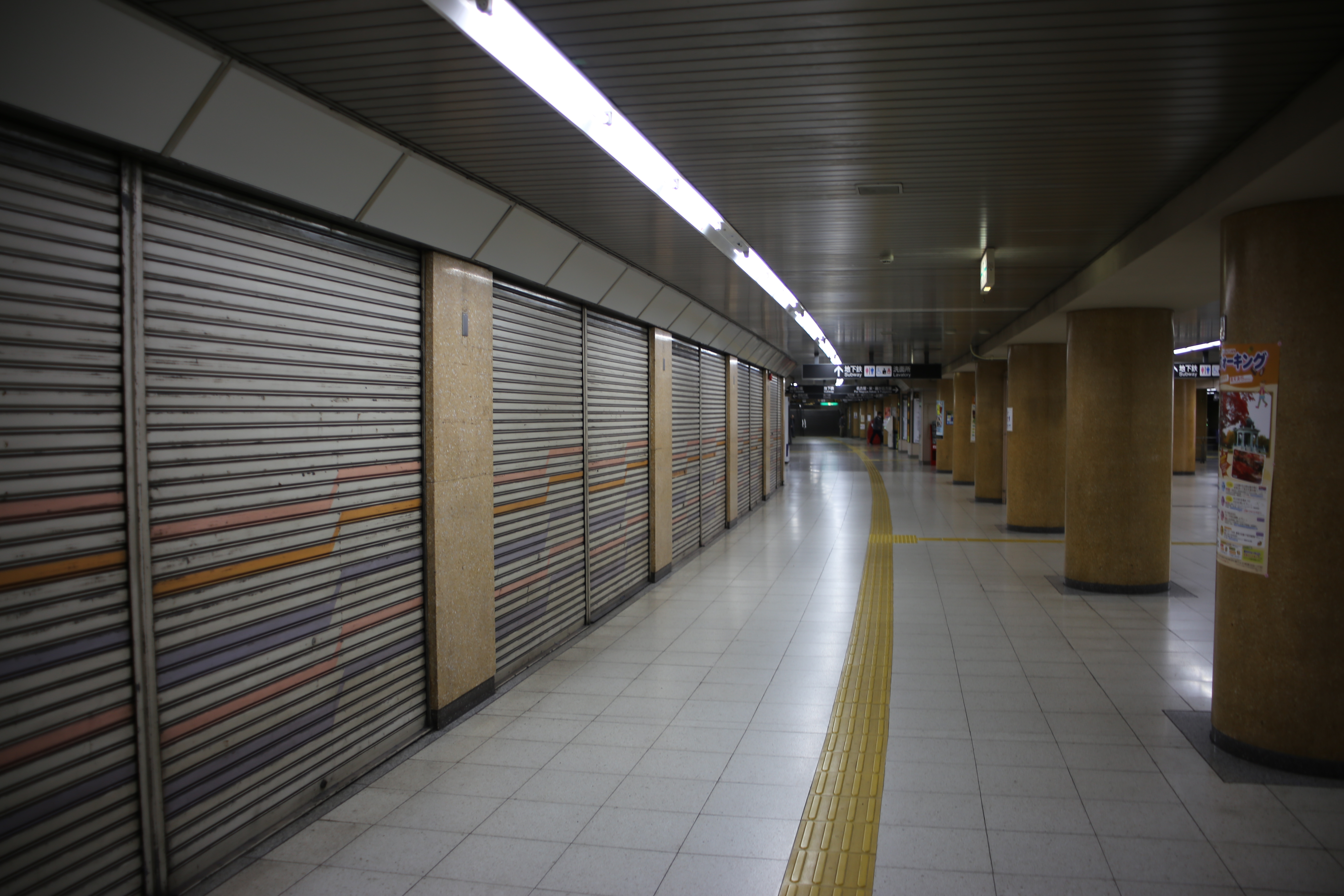 名古屋市営地下鉄東山線中村公園駅